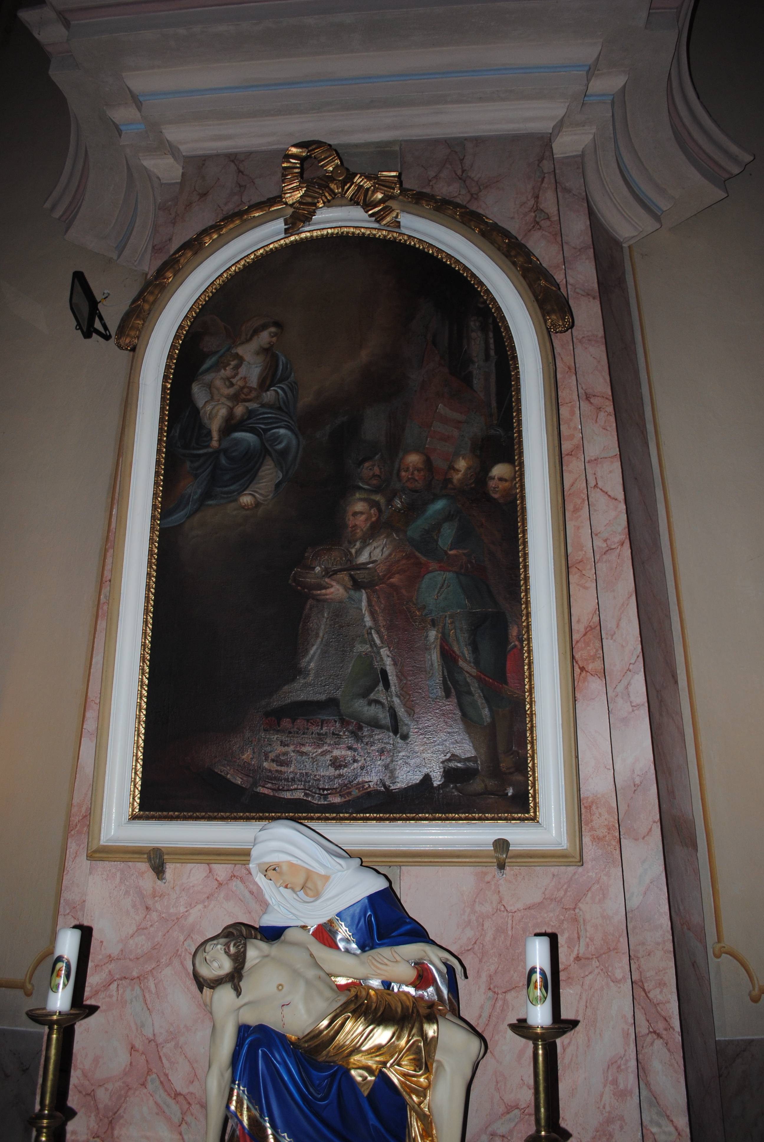 Nemesoroszi, Nagyboldogasszony templom, Szent István felajánlja a koronát Szűz Máriának